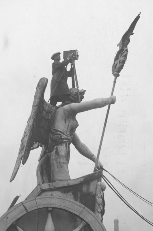 Berlin, Brandenburger Tor, Kameramann Die Quadriga des Brandenburger Tores [Berlin, Brandenburger Tor.- Kameramann mit Filmkamera auf Qudriga stehend]